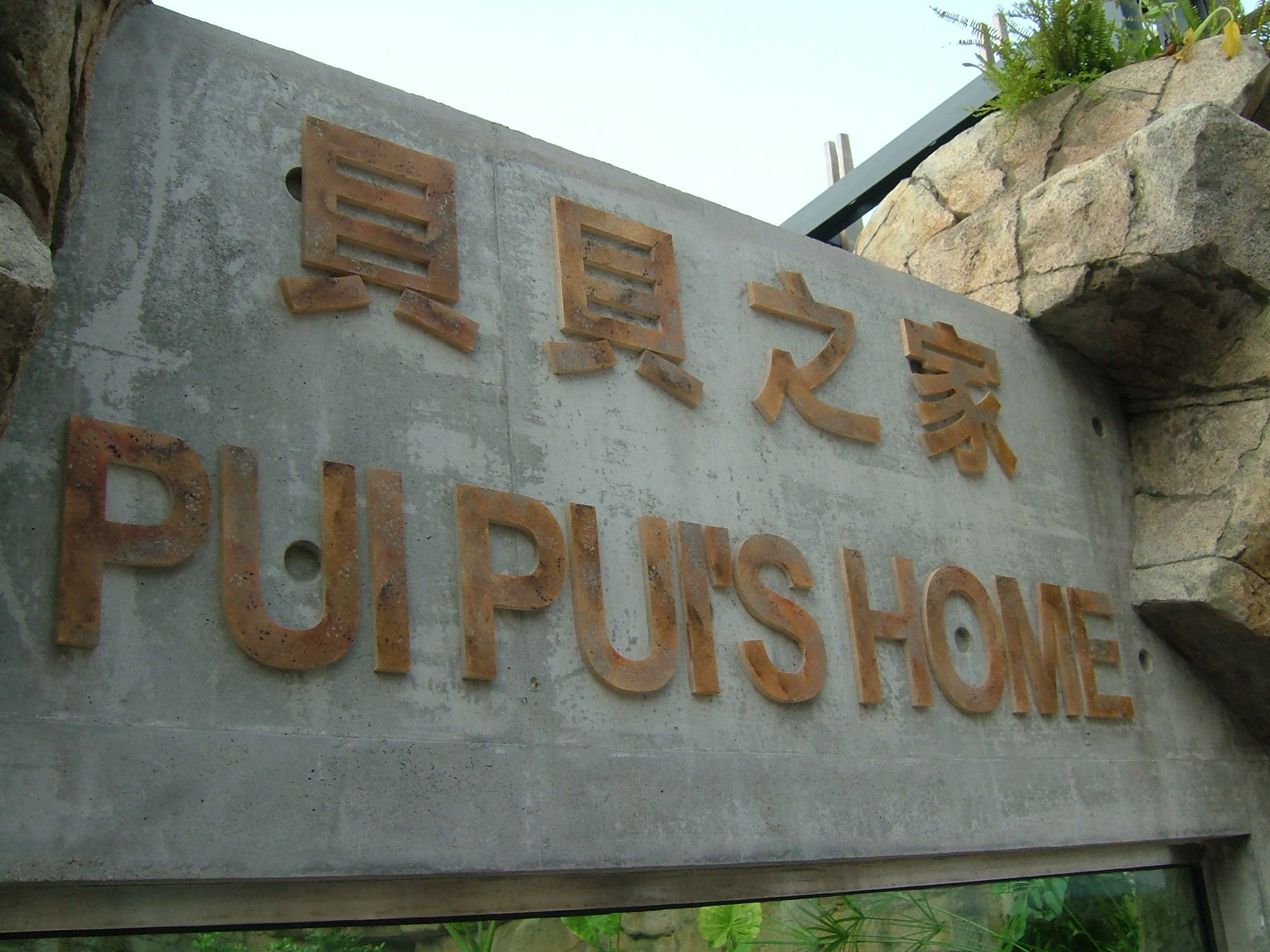 貝貝之家 (Pui Pui's Home)